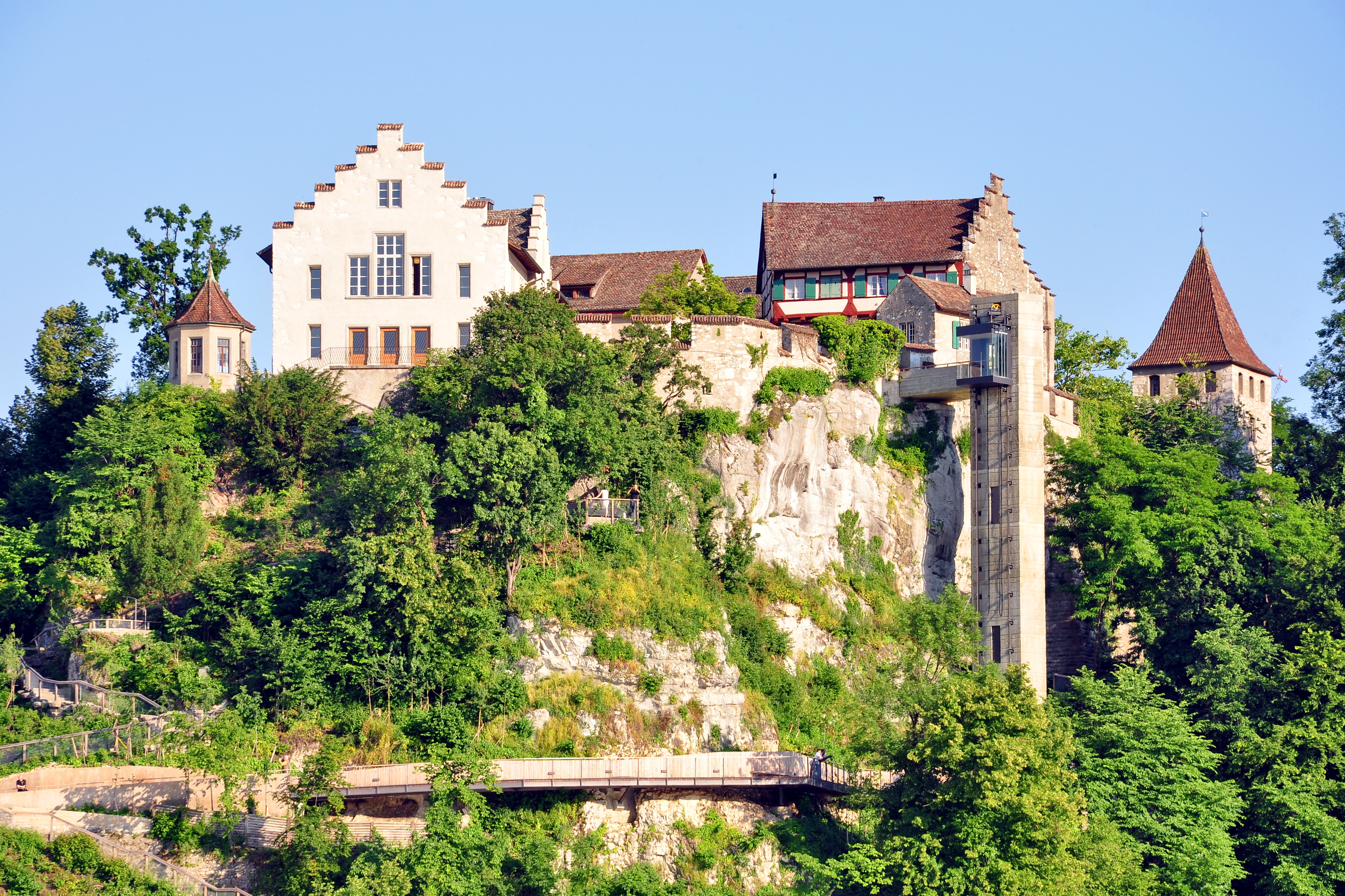 Schloss Laufen in Laufen-Uhwiesen (Switzerland)